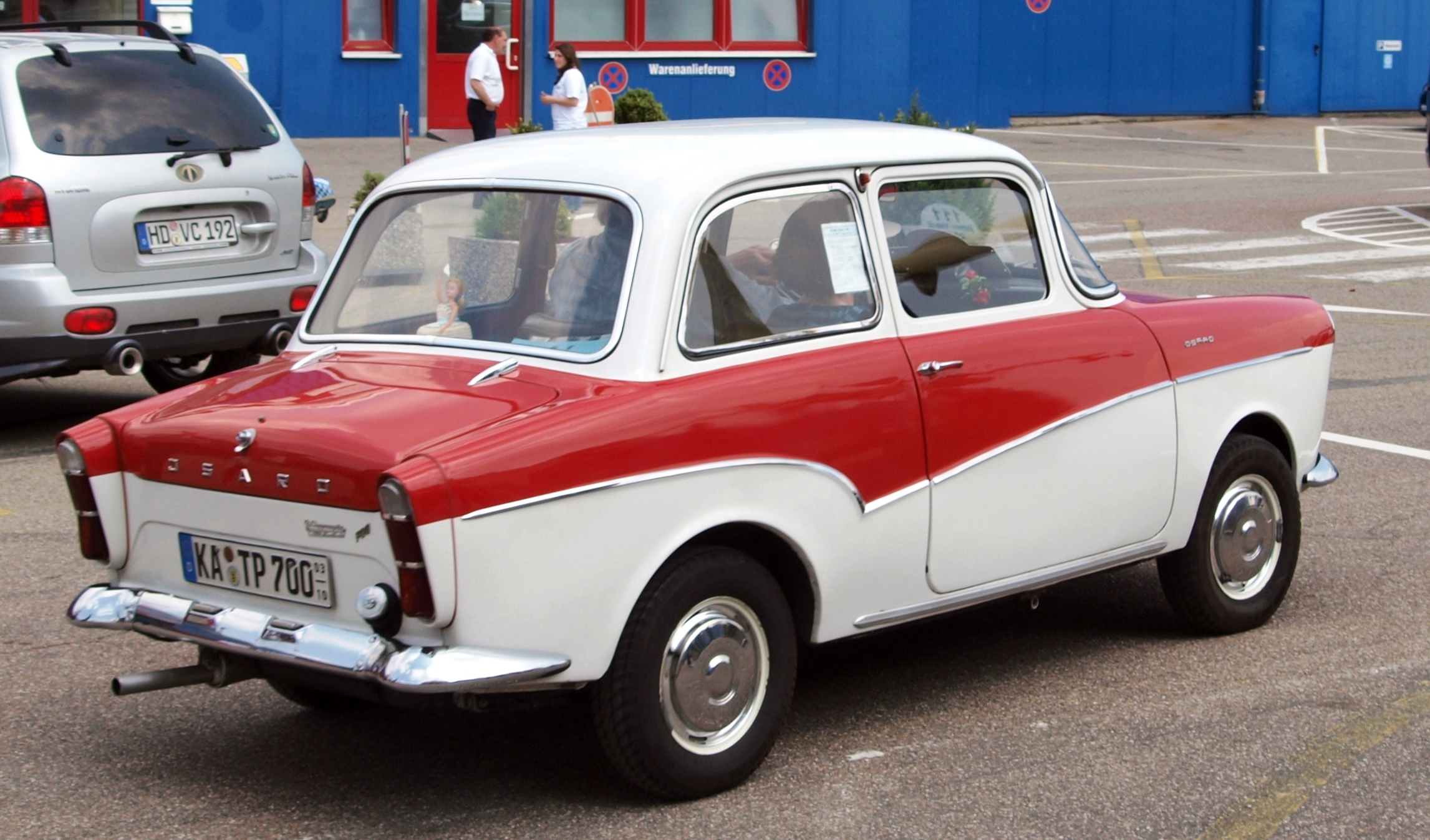 Glas (Isard) T-700